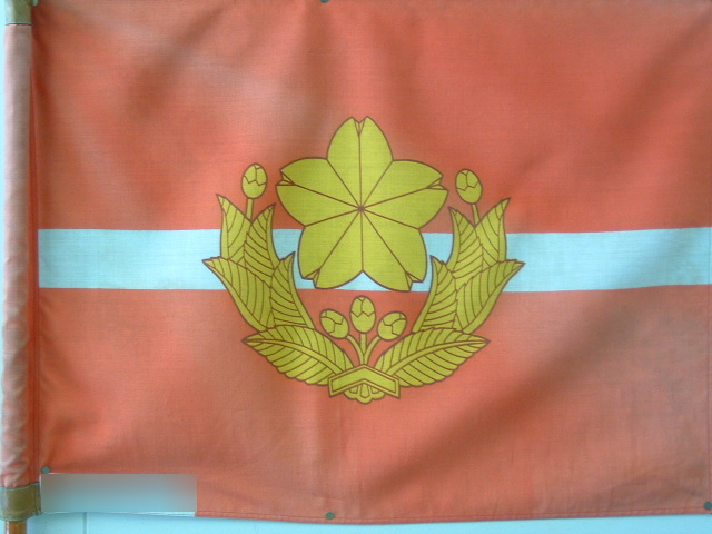 中隊旗（甲）普通科中隊用、3佐ないし1尉の指揮官の部隊